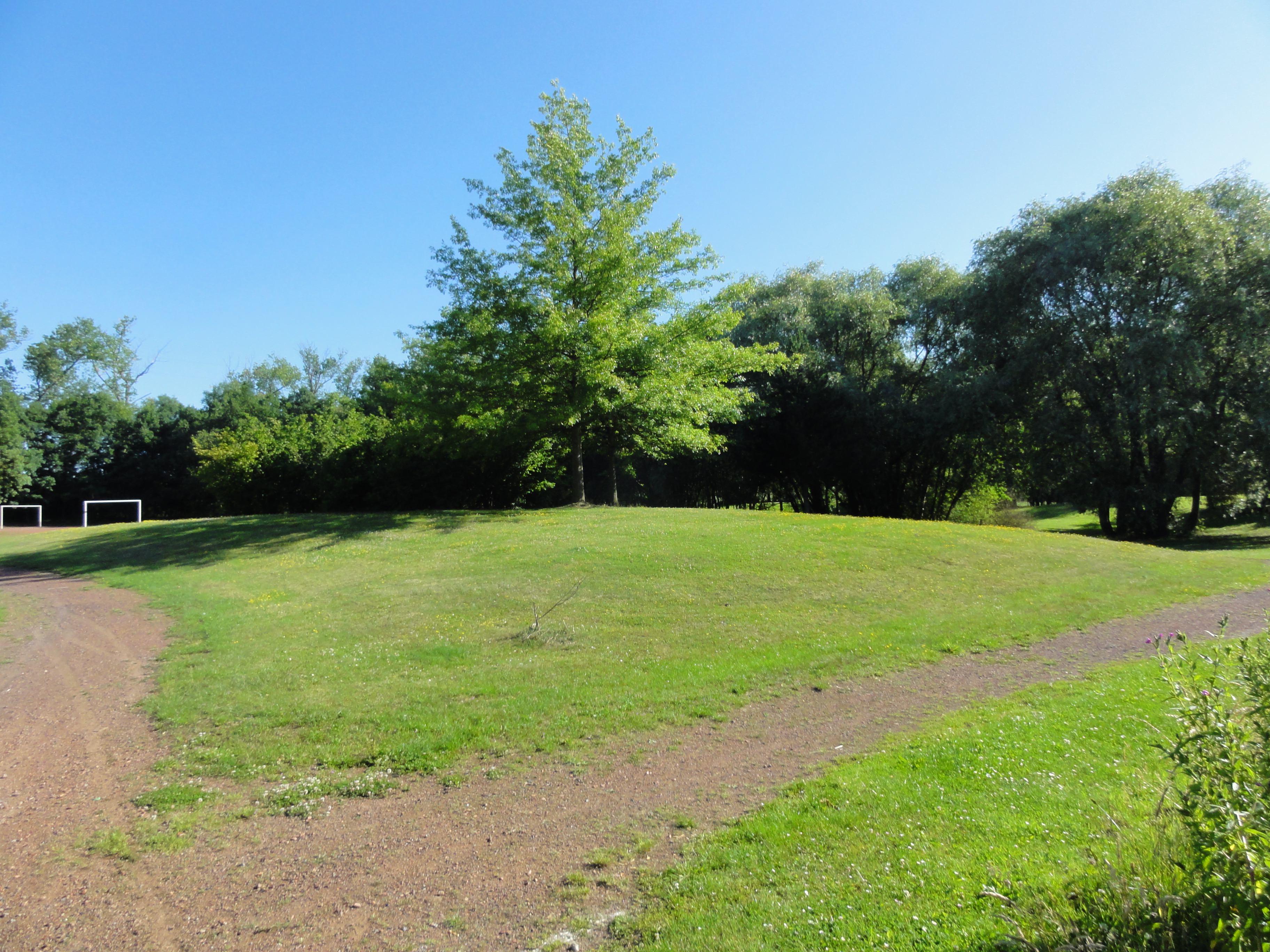 Terril n° 122A dit 10 de l'Escarpelle Ouest, Fosse n° 10 de la Compagnie des mines de l'Escarpelle, Leforest, Pas-de-Calais, Nord-Pas-de-Calais, France.